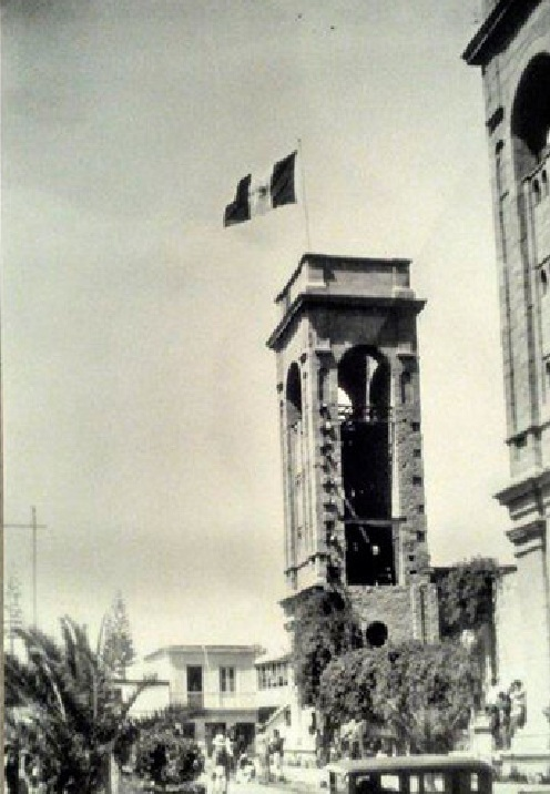 Bandera peruana en la catedral de la ciudad durante la reincorporación de Tacna al Perú.